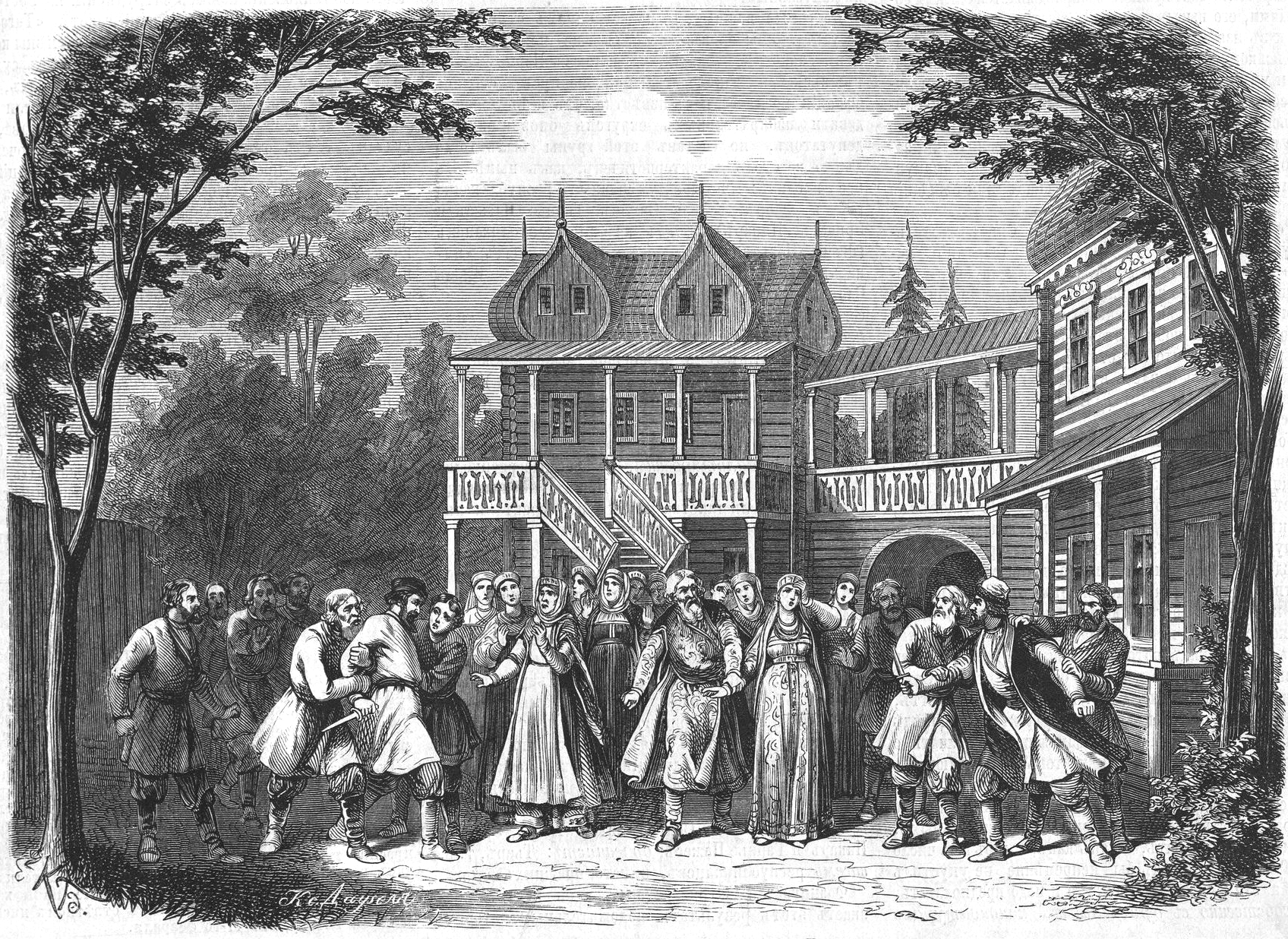 Последняя сцена оперы П.И. Чайковскго "Воевода"